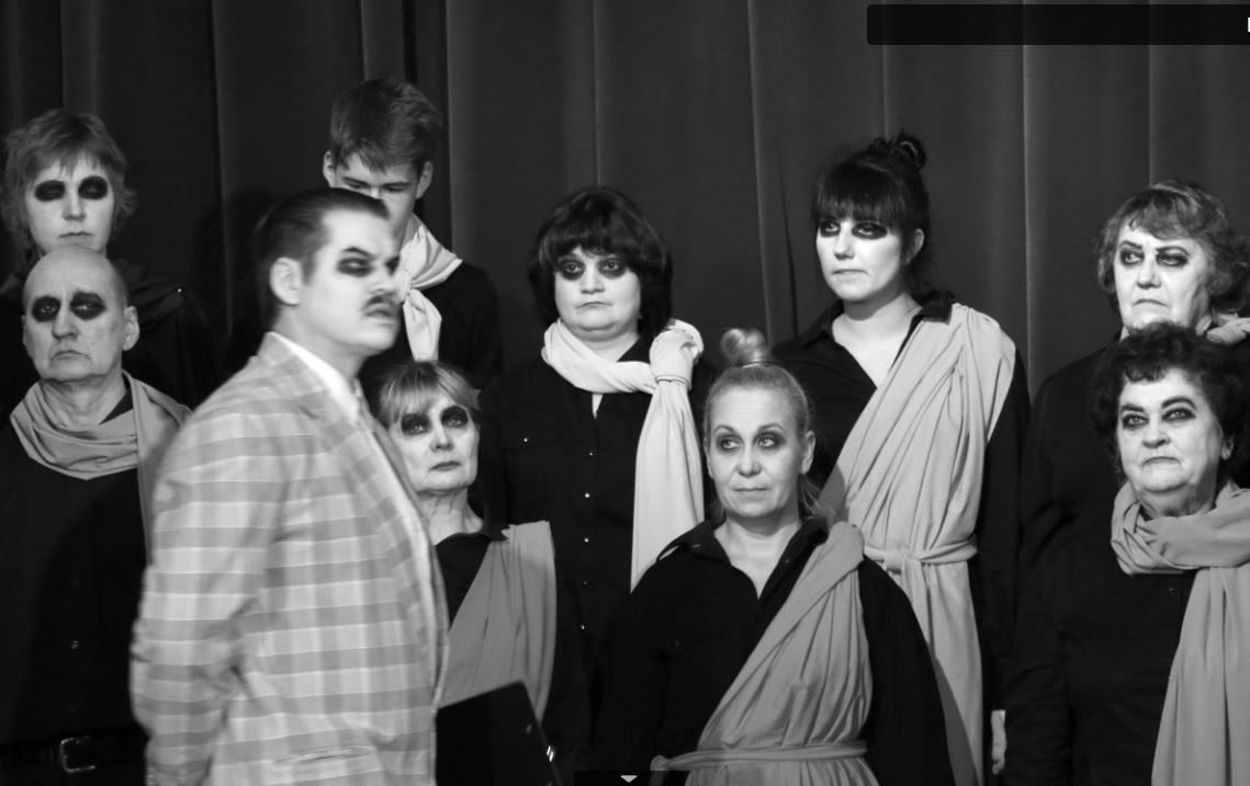 vv